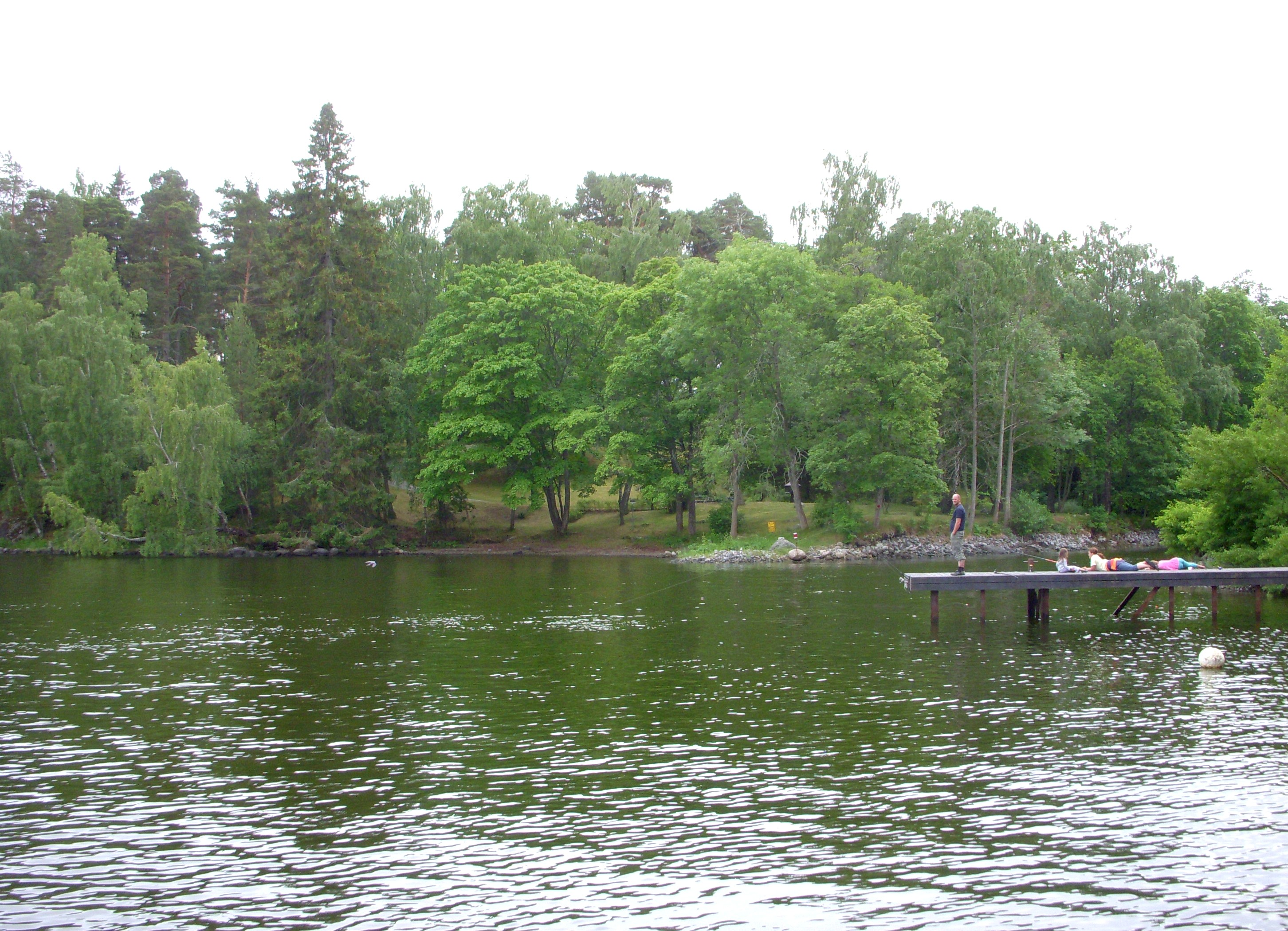 Baggenstäket med Stäket redutt på andra sidan sundet.